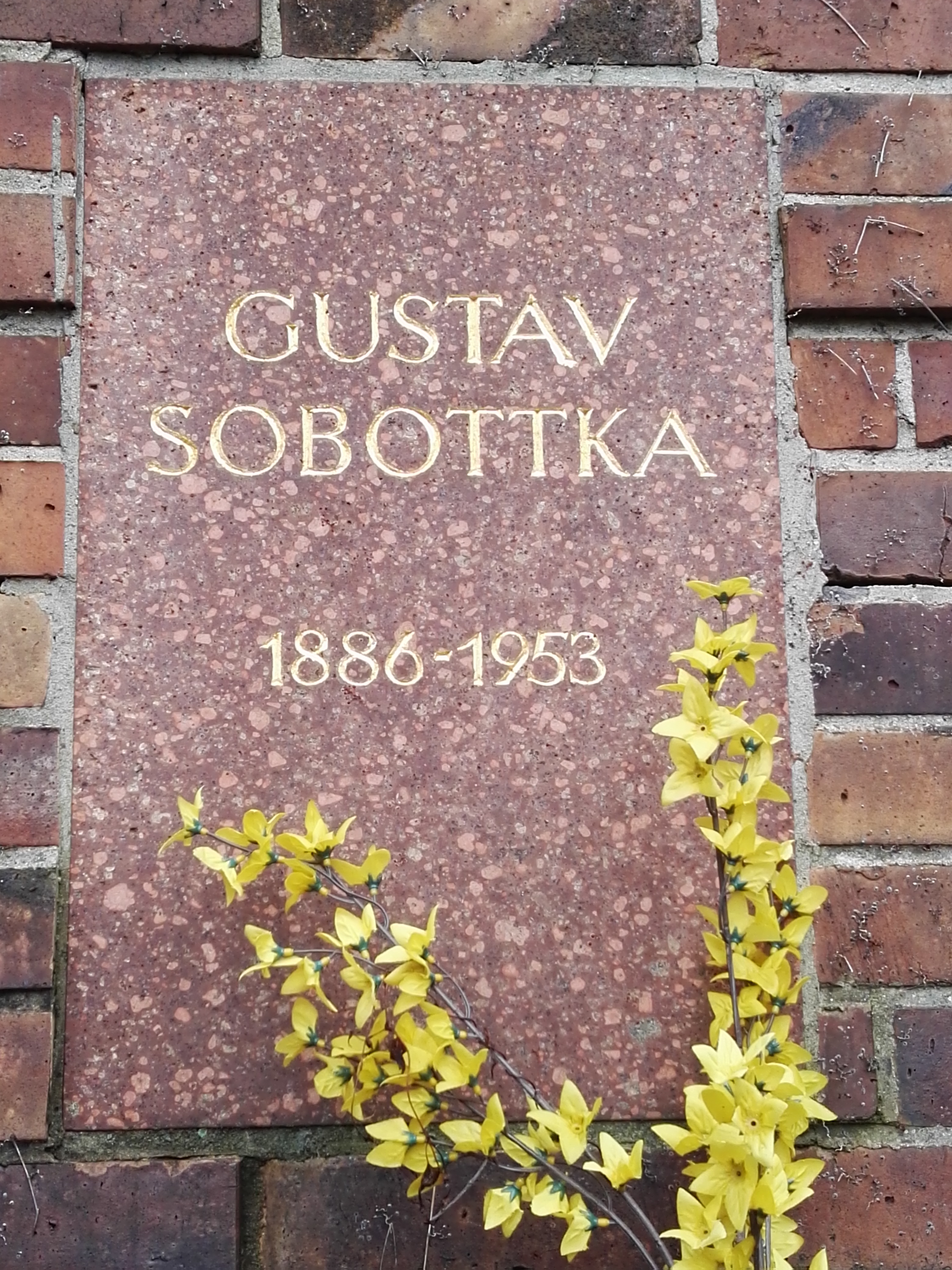 Grab von Gustav Sobottka in der Gedenkstätte der Sozialisten auf dem Zentralfriedhof Friedrichsfelde in Berlin-Lichtenberg